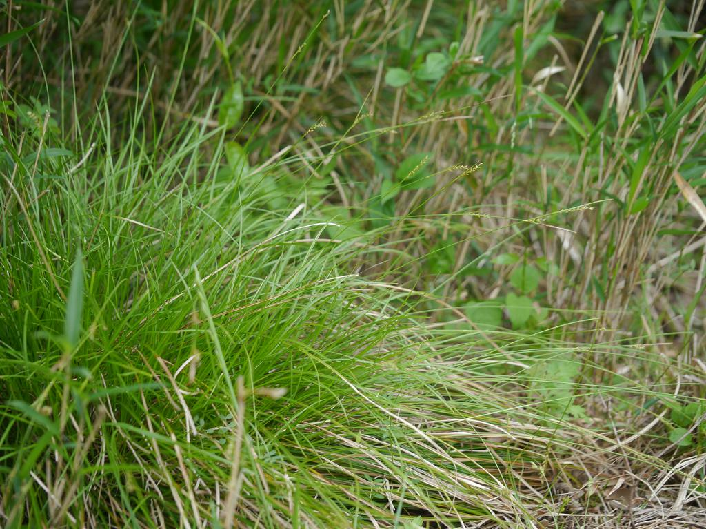 Carex stenostachys：ニシノホンモンジスゲ 2018/05/04 三重県亀山市：Kameyama C. Mie Pref.